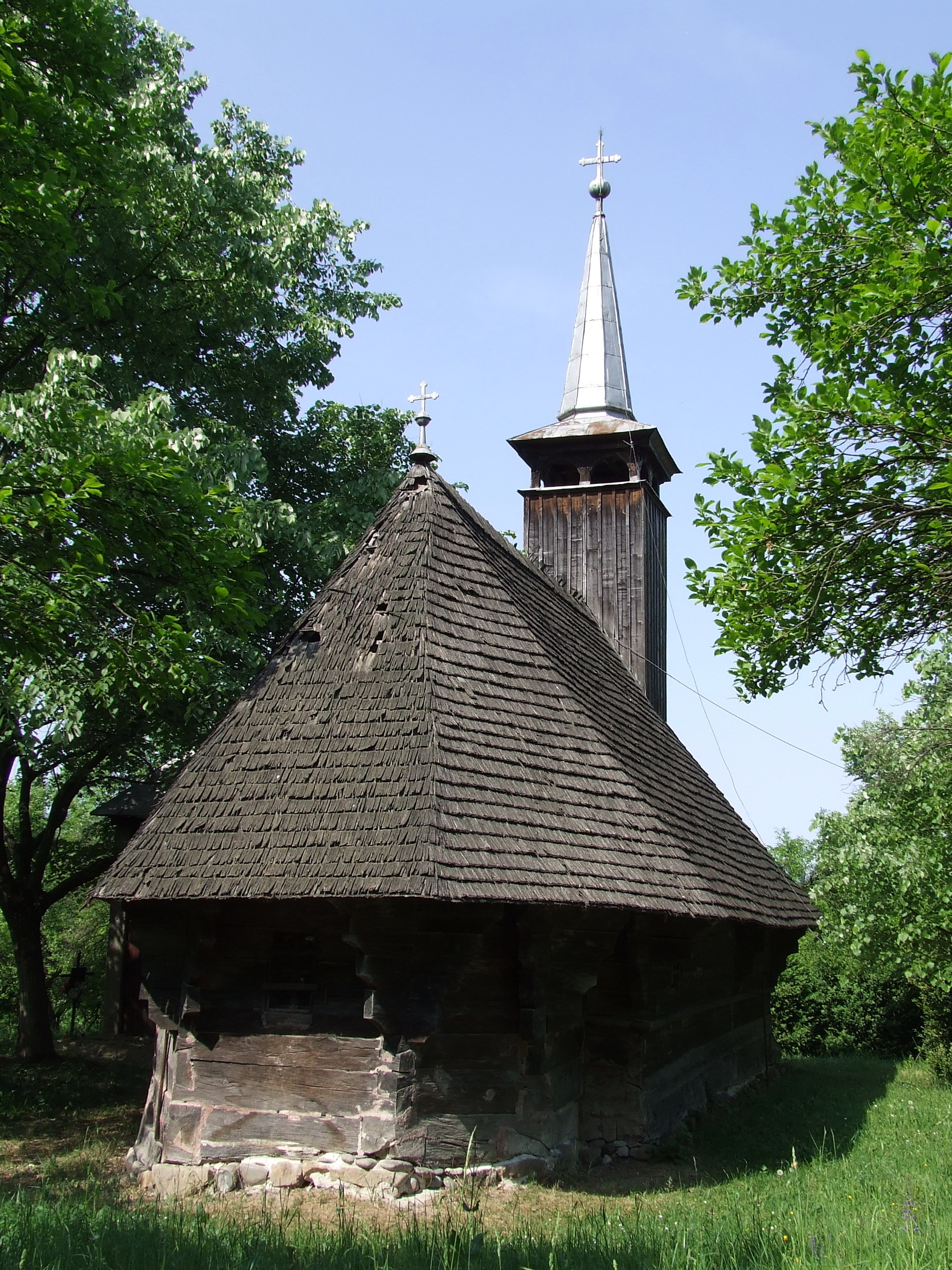 Biserica de lemn din Gheghie, judeţul Bihor.